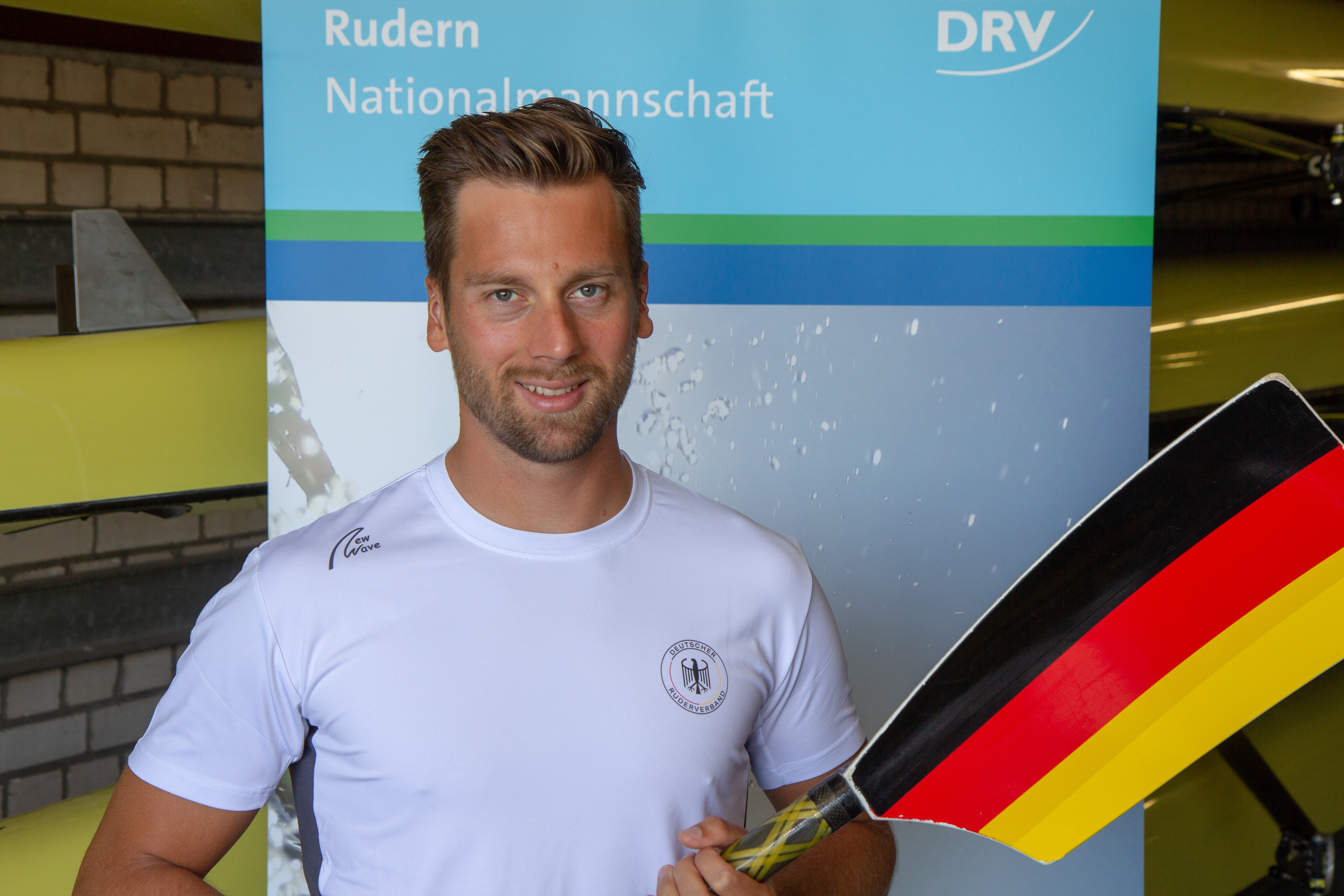 Lars Hartig beim Medientag des Deutschen Ruderverbandes in der Ruderakademie Ratzeburg am 22. August 2018.